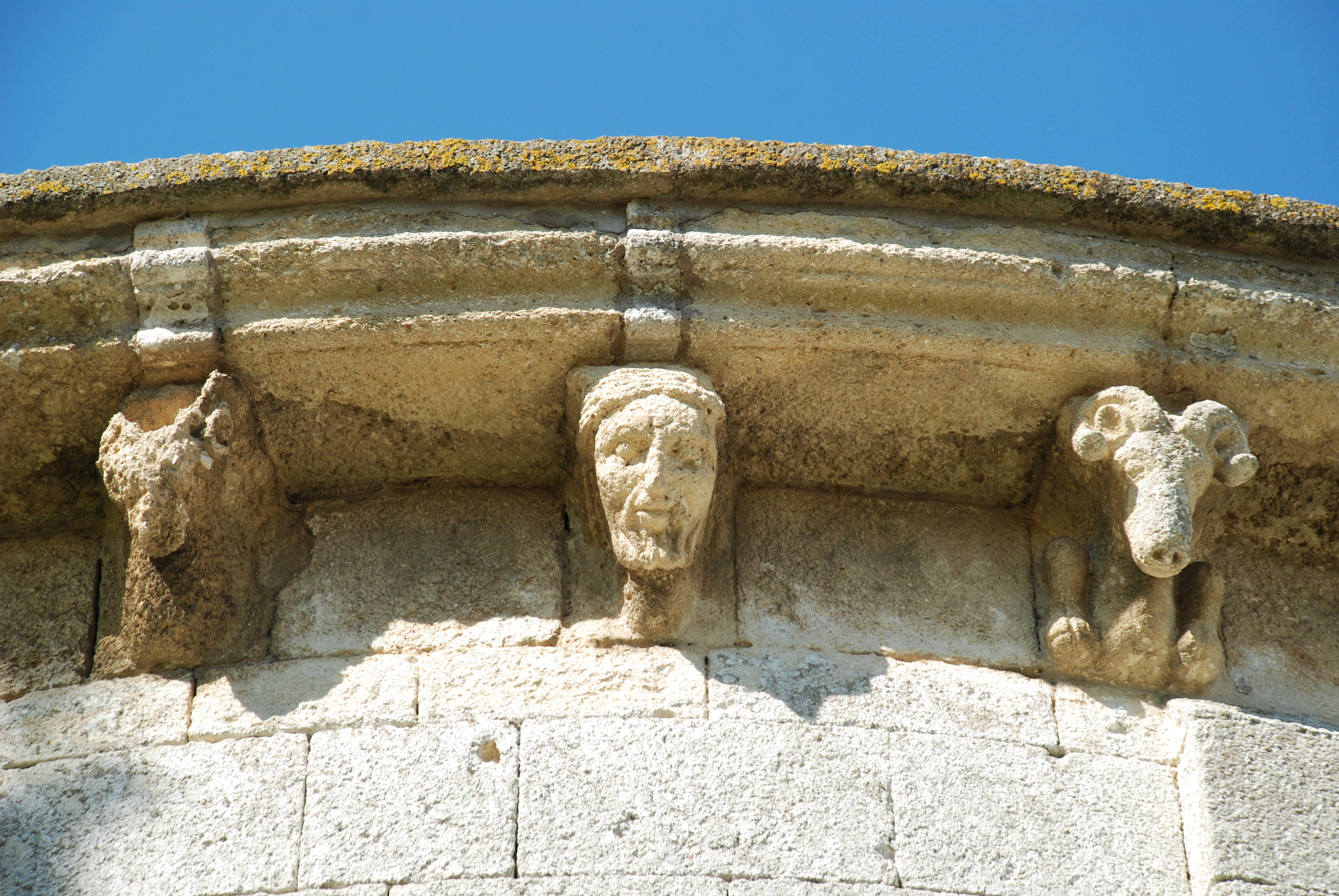 France - Languedoc - Hérault - Église Saint-Laurent de Lattes